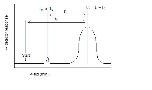 Gaschromatografie of hoge druk chromatografie met de bijbehorende berekeningen voor de retentietijd